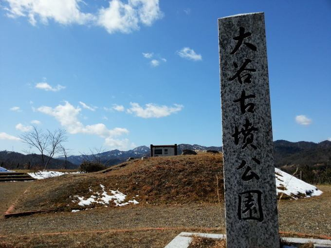 大谷古墳の石碑